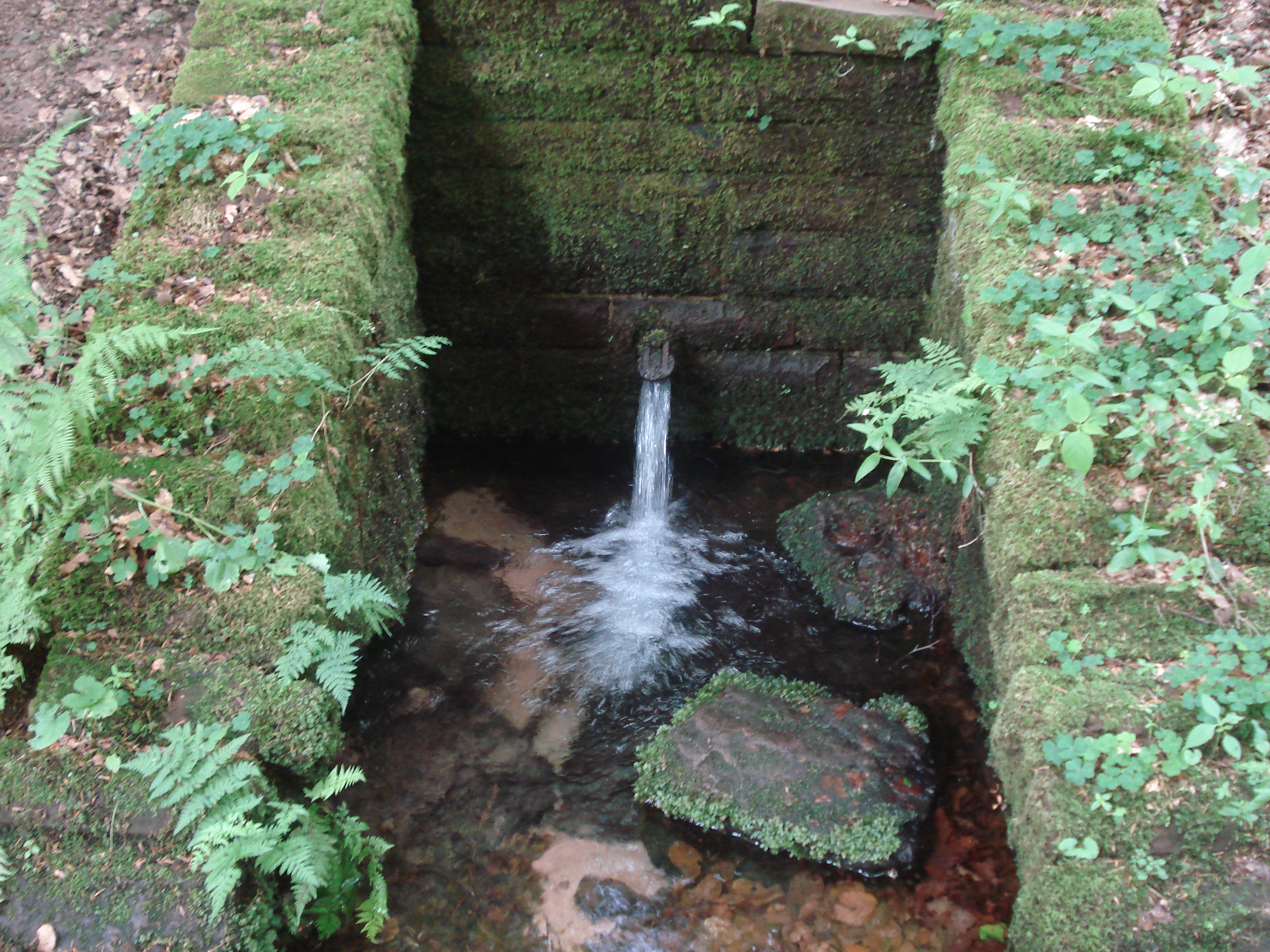 Der Metzenbrunnen, der Ursprung des Metzenbachs, an Fuße des Geiersberges im Spessart